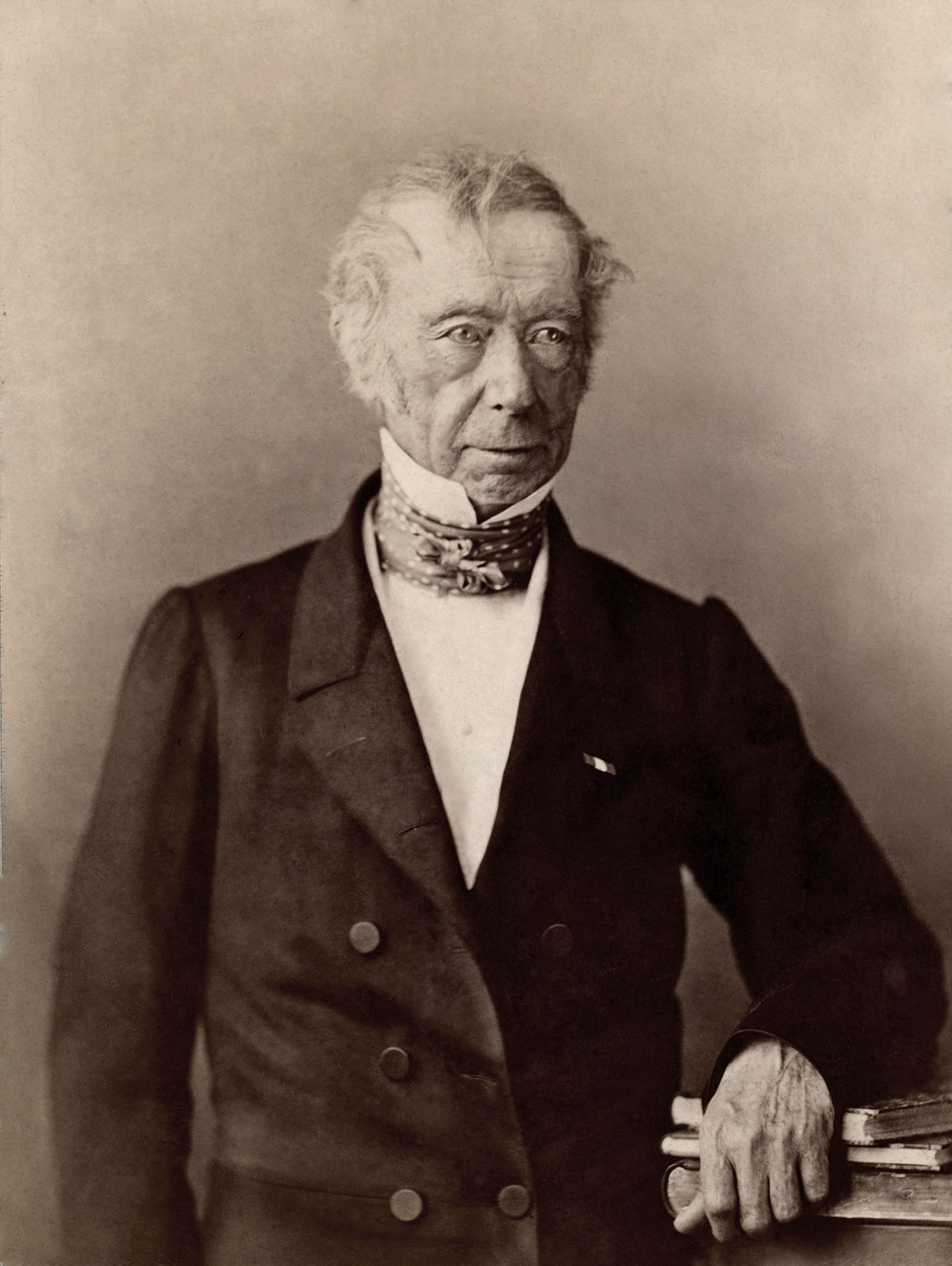 Jean-Pons-Guillaume Viennet (1777 - 1868), homme politique, poète et auteur dramatique français.